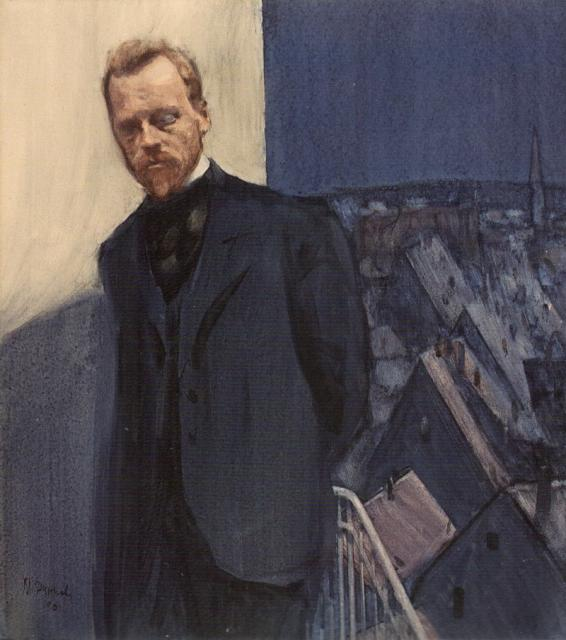 Портрет Константина Бальмонта выполненный Дурновым.